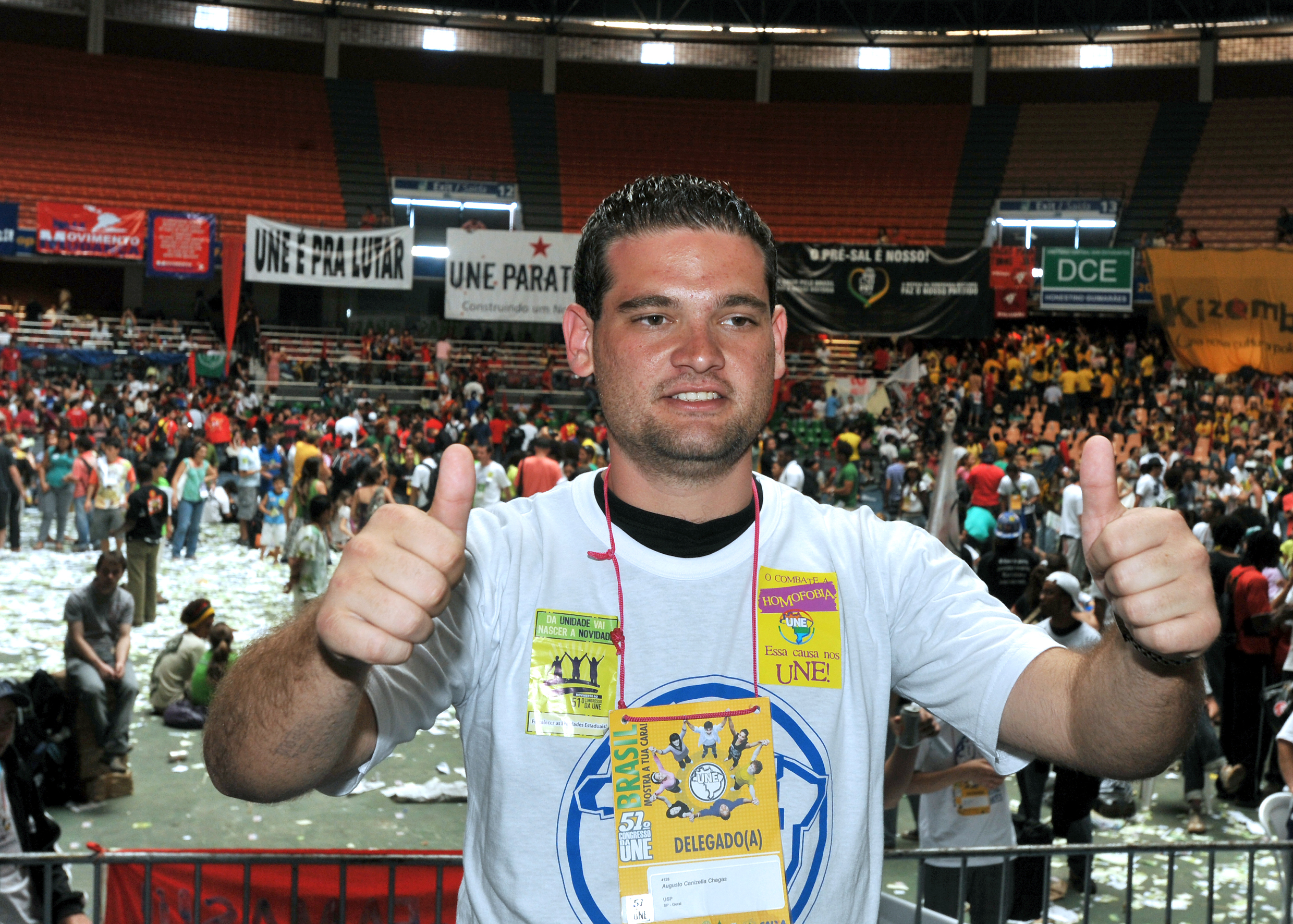 O novo presidente da entidade, Augusto Chagas, eleito em 20 de julho de 2009 para dois anos de mandato durante o 51º Congresso da UNE.